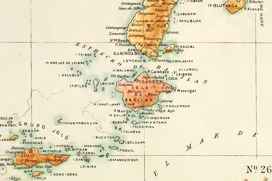 Fragmento del mapa de la página 81 del Atlas